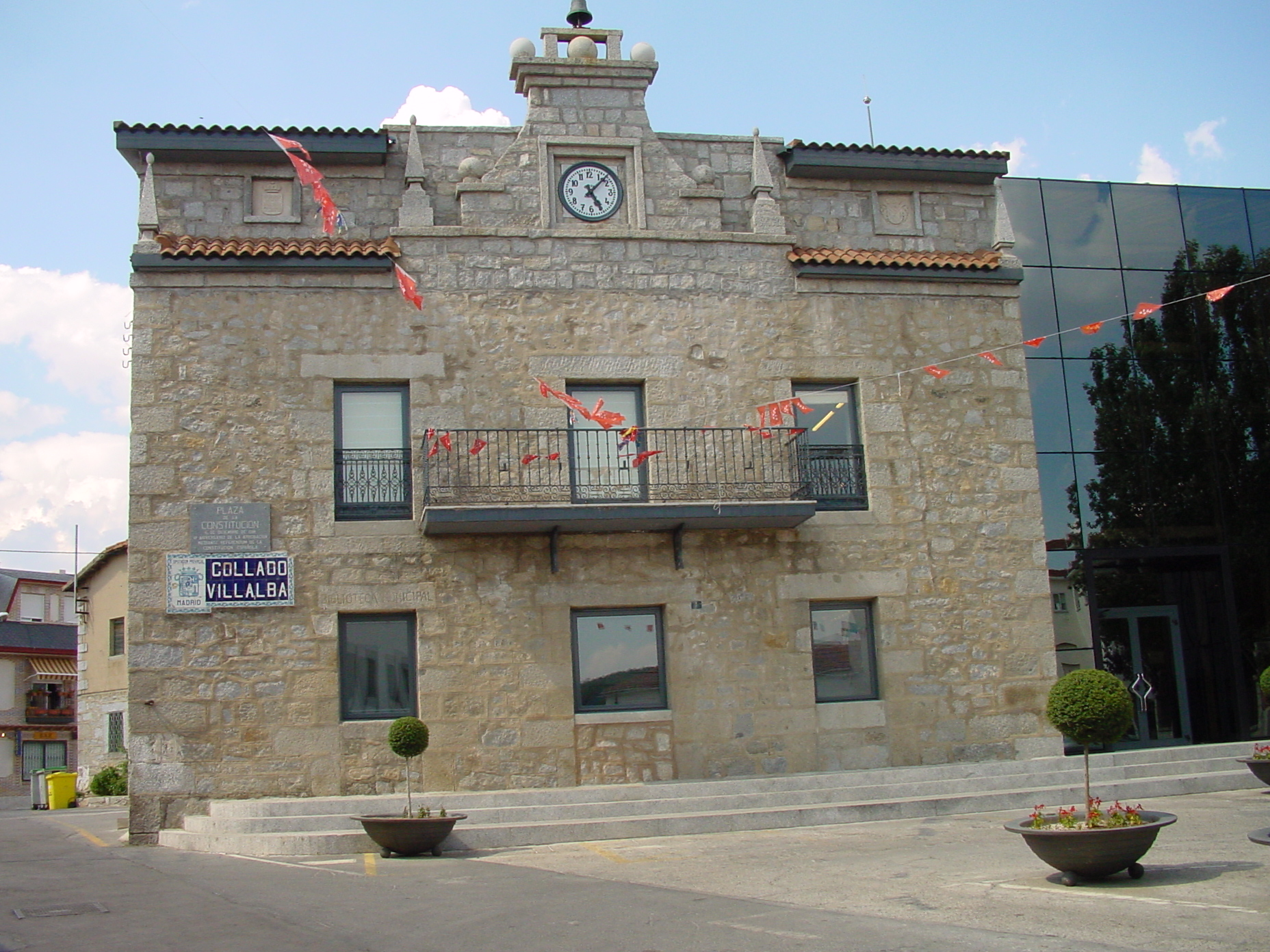 Biblioteca municipal de Collado Villalba.